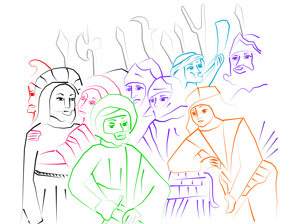 Représentation de la fresque de l'arrestation du Christ (Eglise Saint-Pierre - Saint-Pé-d'Ardet)